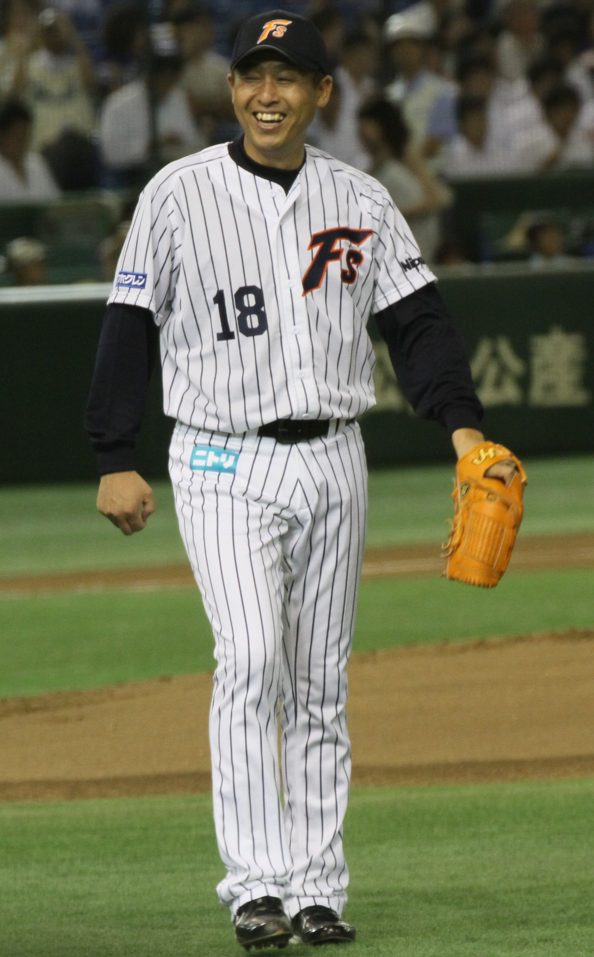 2013年9月3日、北海道日本ハムファイターズ対福岡ソフトバンクホークス戦、試合前の元南海・山本和範との1打席勝負に挑んだ元日本ハムの岩本勉。東京ドームにて。